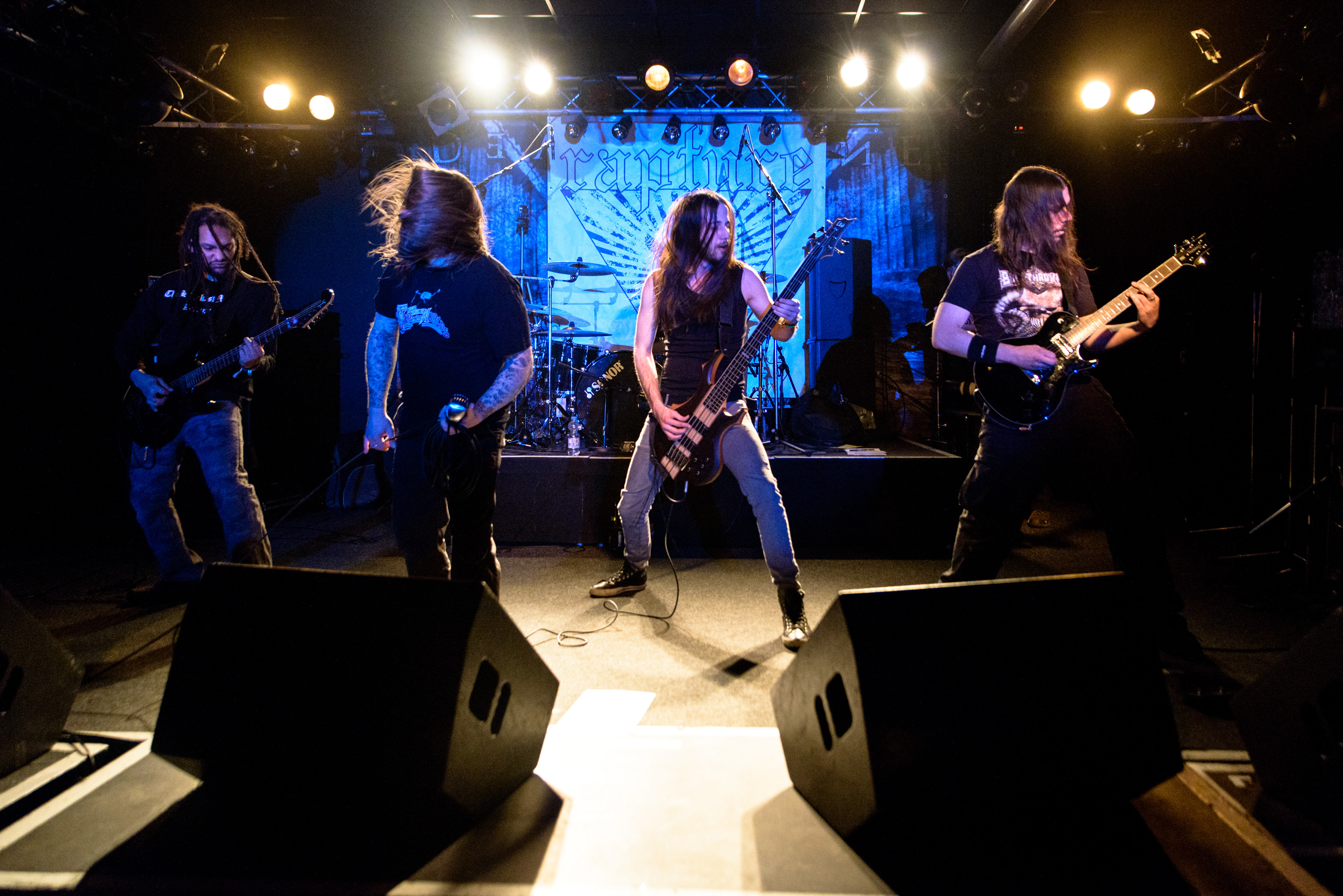 Rapture Beim dark Munich Festival 2014